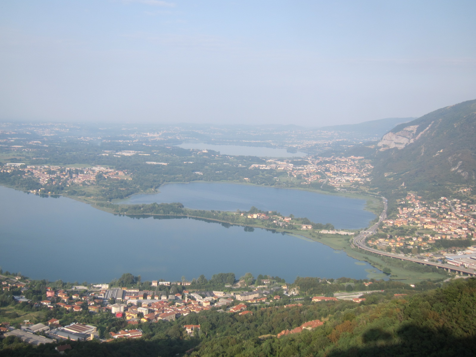 Lago di Annone, diviso dalla penisola di Isella, in fondo il lago di Pusiano, in primo piano la località di Sala al Barro, visto dal Monte Barro verso ovest